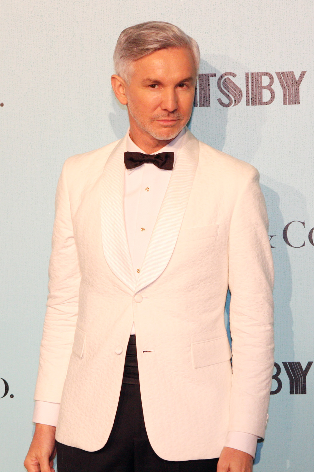 Baz Luhrmann